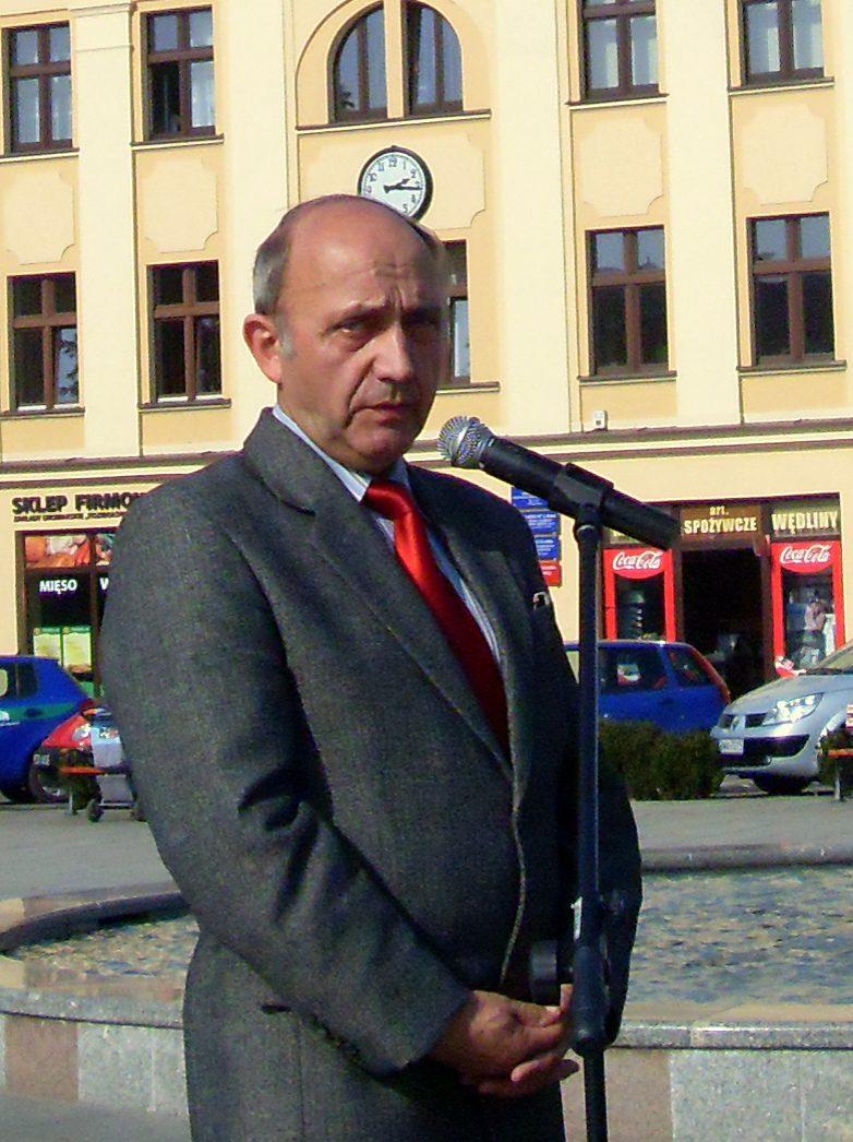 Stanisław Wilczyński - burmistrz Wągrowca